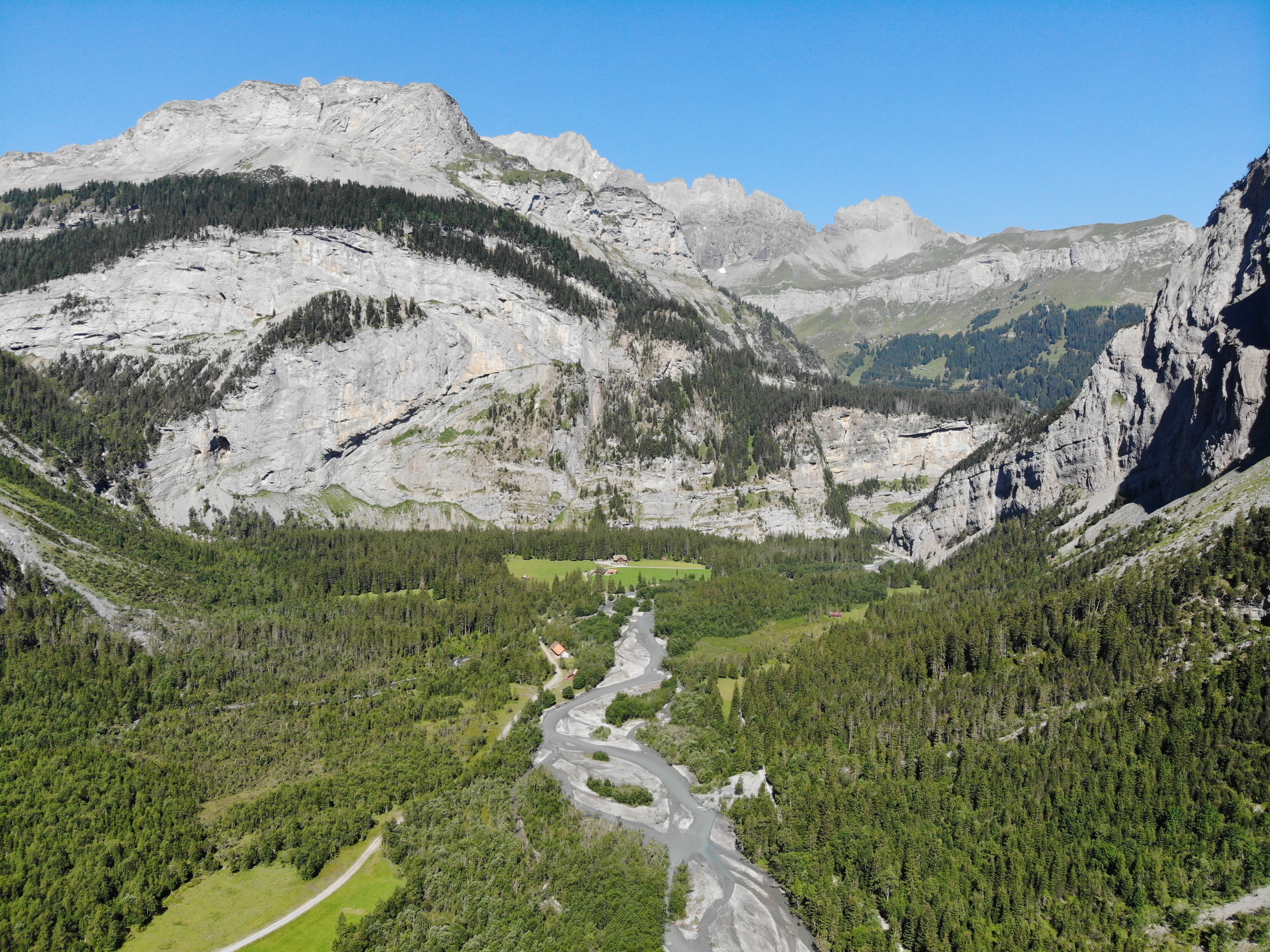 Gasterntal Blick nach Nordwesten